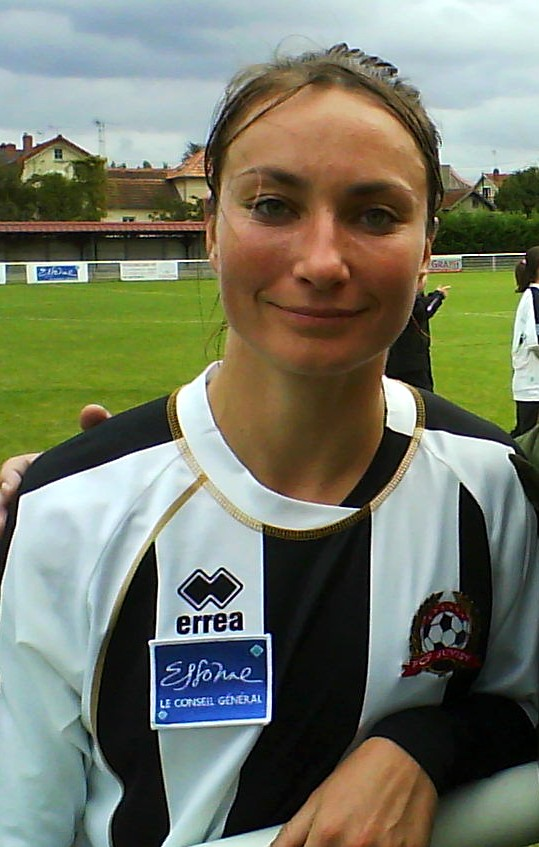 Gaetane Thiney